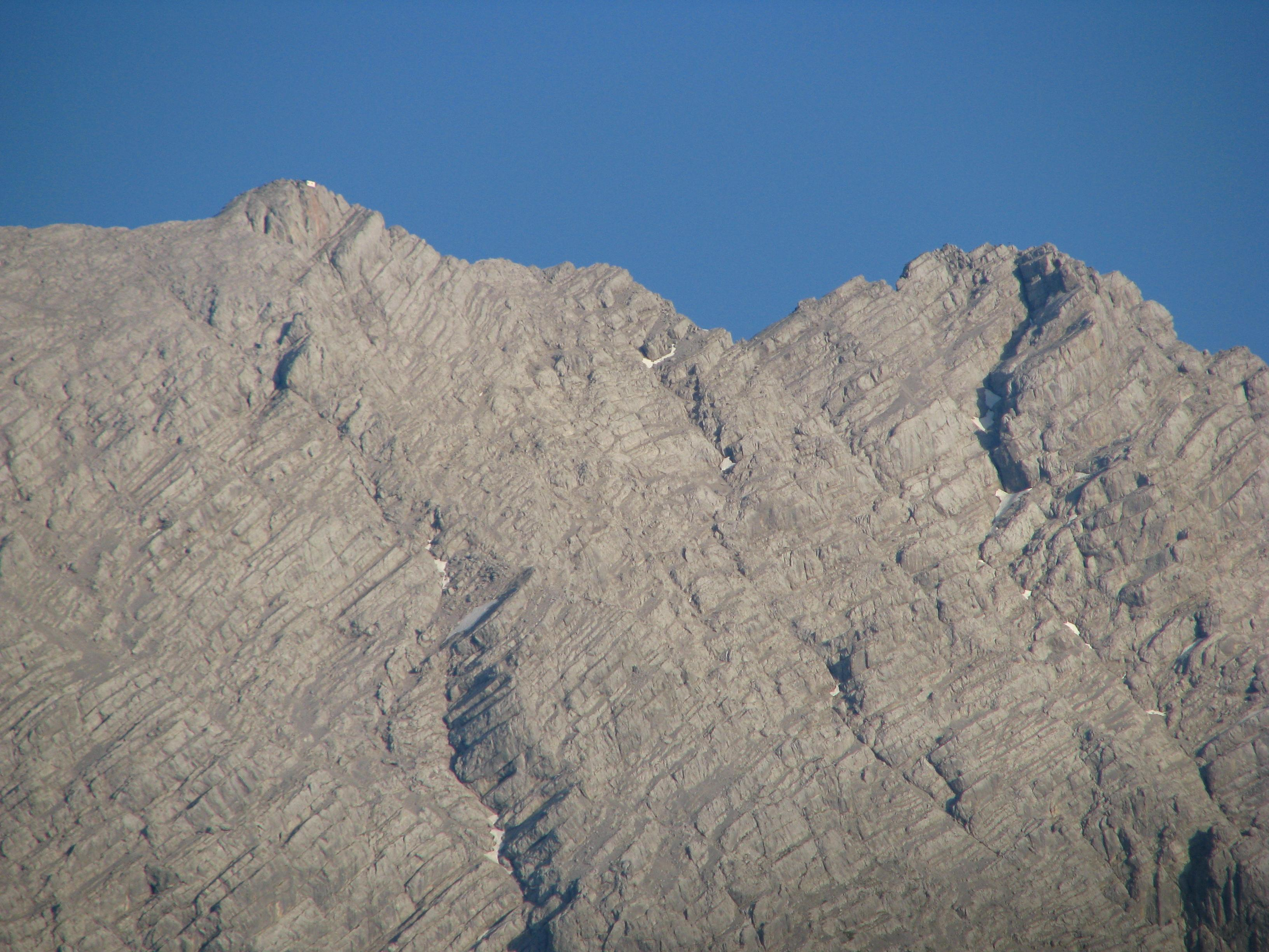 Watzmann-Westwand mit Hocheck (mit Unterstandshütte) und Mittelspitze.